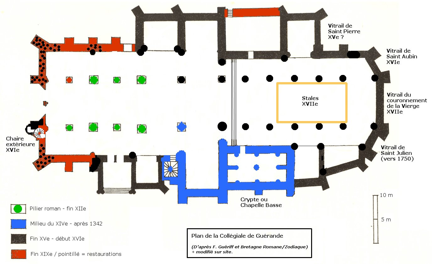 Plan Collégiale Guérande roman gothique